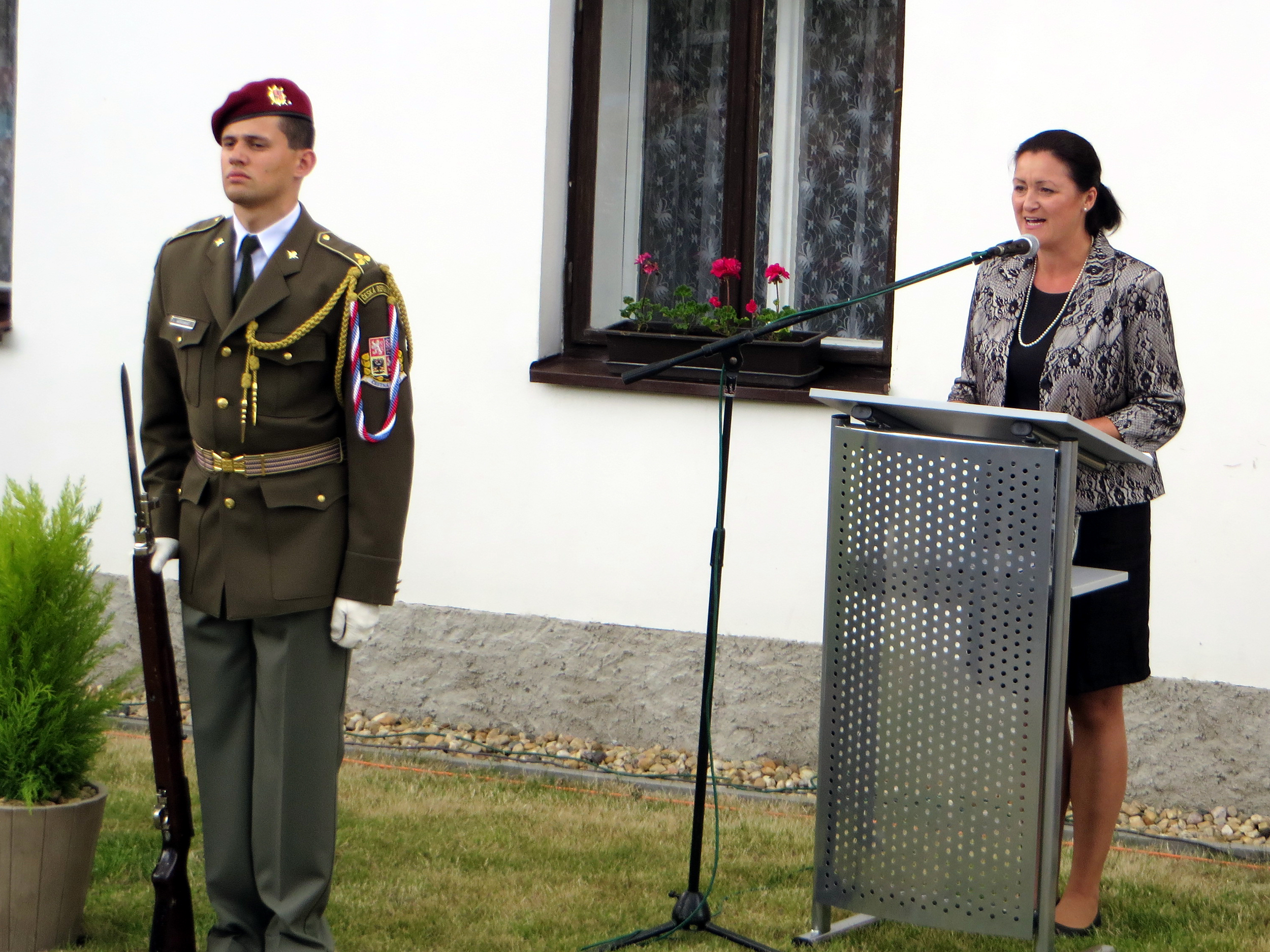 Senice. Pietní akt k uctení památky skupiny Silver A. Poslankyně Helena Langšádlová.